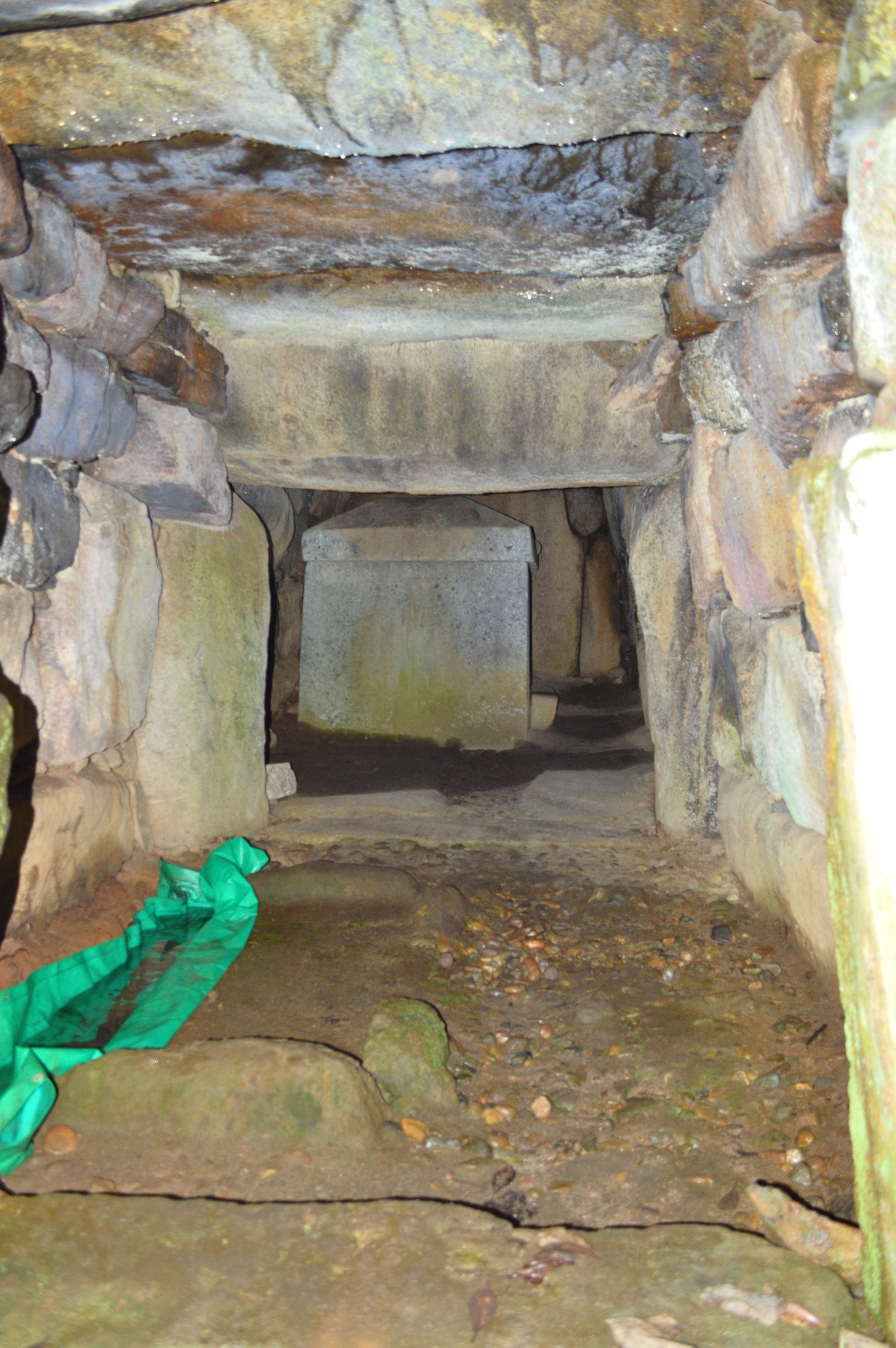 今市大念寺古墳 前室